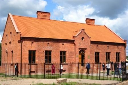 В Калининградской области после реставрации открылся "Домик Канта"